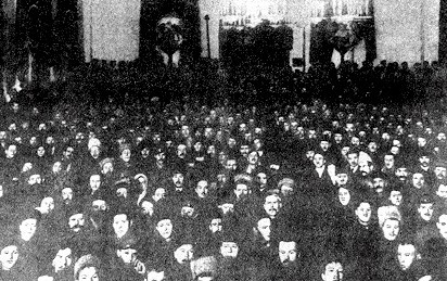 II Всеросійський з'їзд Рад робітничих і солдатських депутатів (2nd All-Russian Congress of Soviets